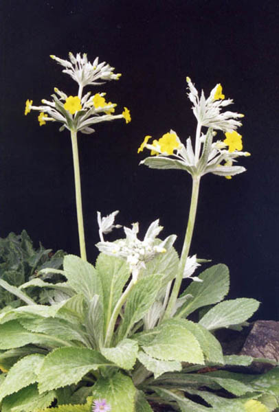 Primula verticilata